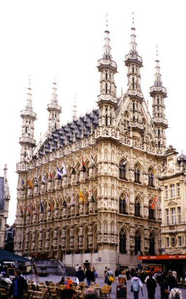 Stadhuis van Leuven. Eigen foto, juli 1999.